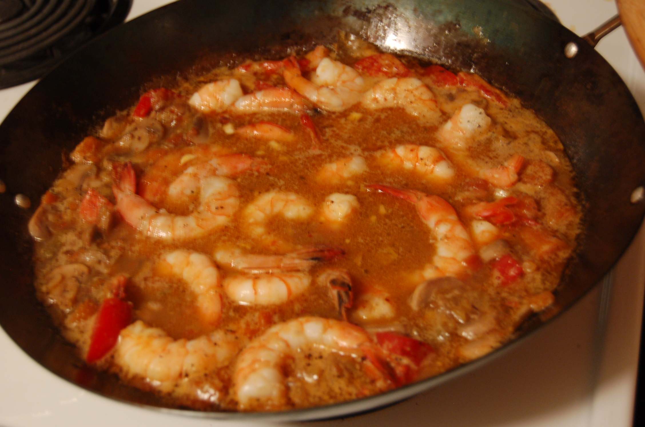 Bullinada catalane